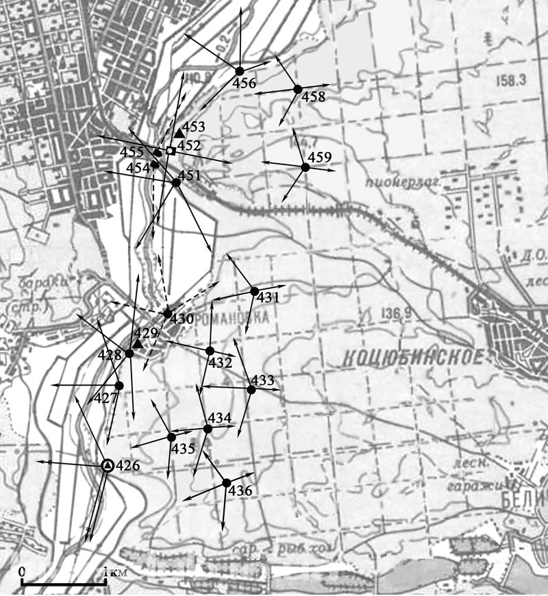 Схема БРО 2 Київського укріпленого району, викладена у вільний доступ авторами книги "Киевский укрепленный район 1928—1941" (